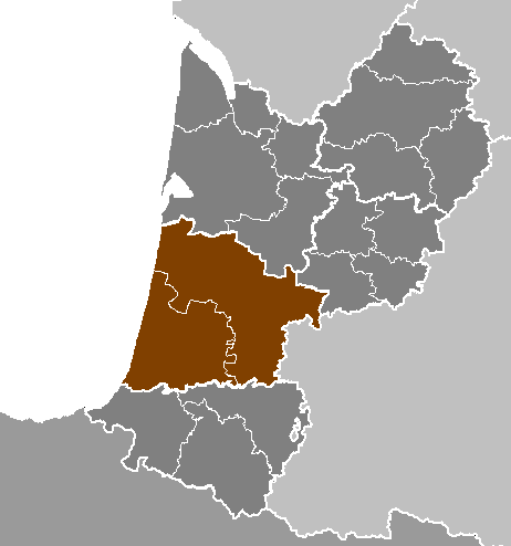 Maps of arrondissements and cantons of France: Département des Landes.PNG (Région Aquitaine)